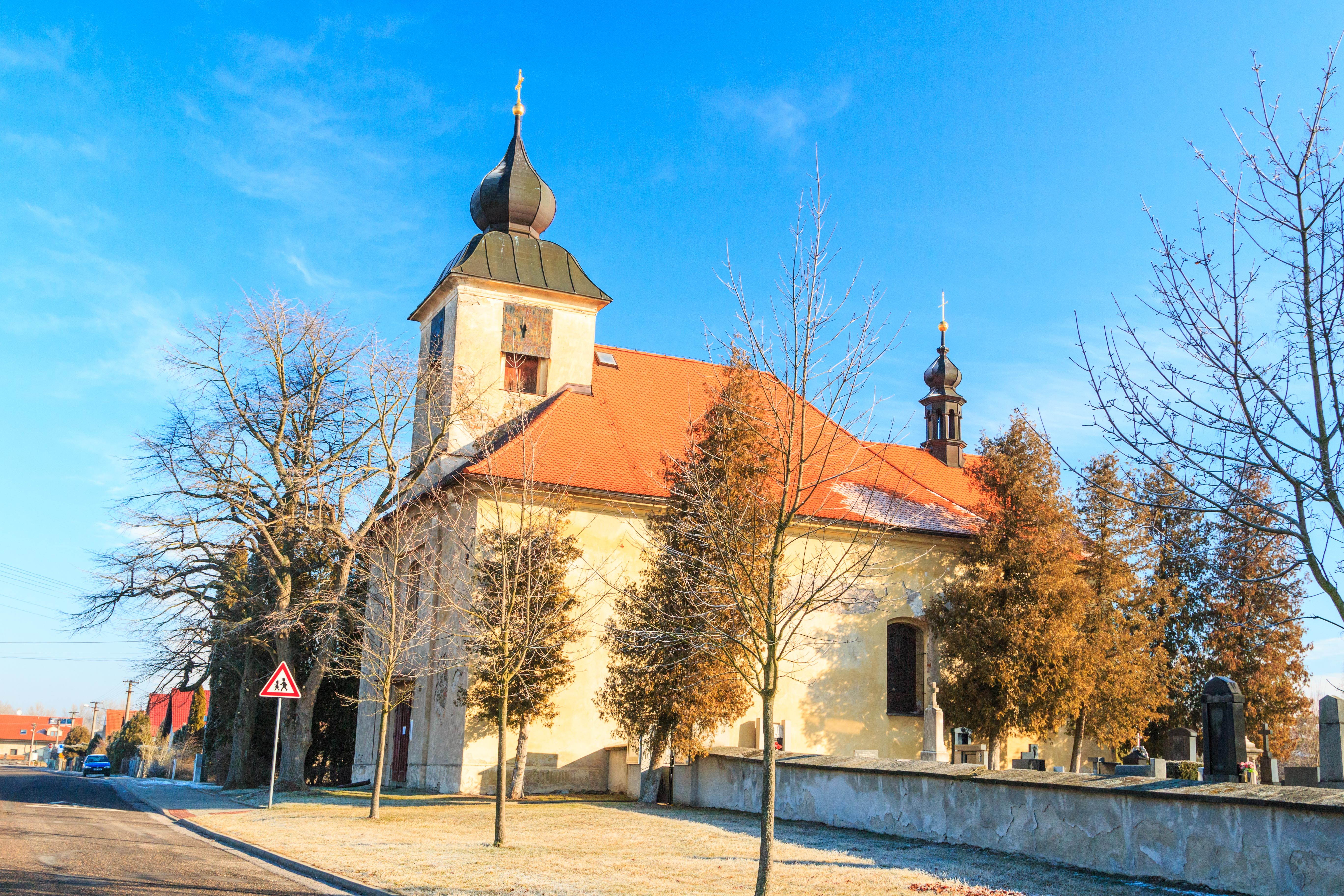 Kostel svatého Jana Nepomuckého, st. 35, Lány na Důlku.